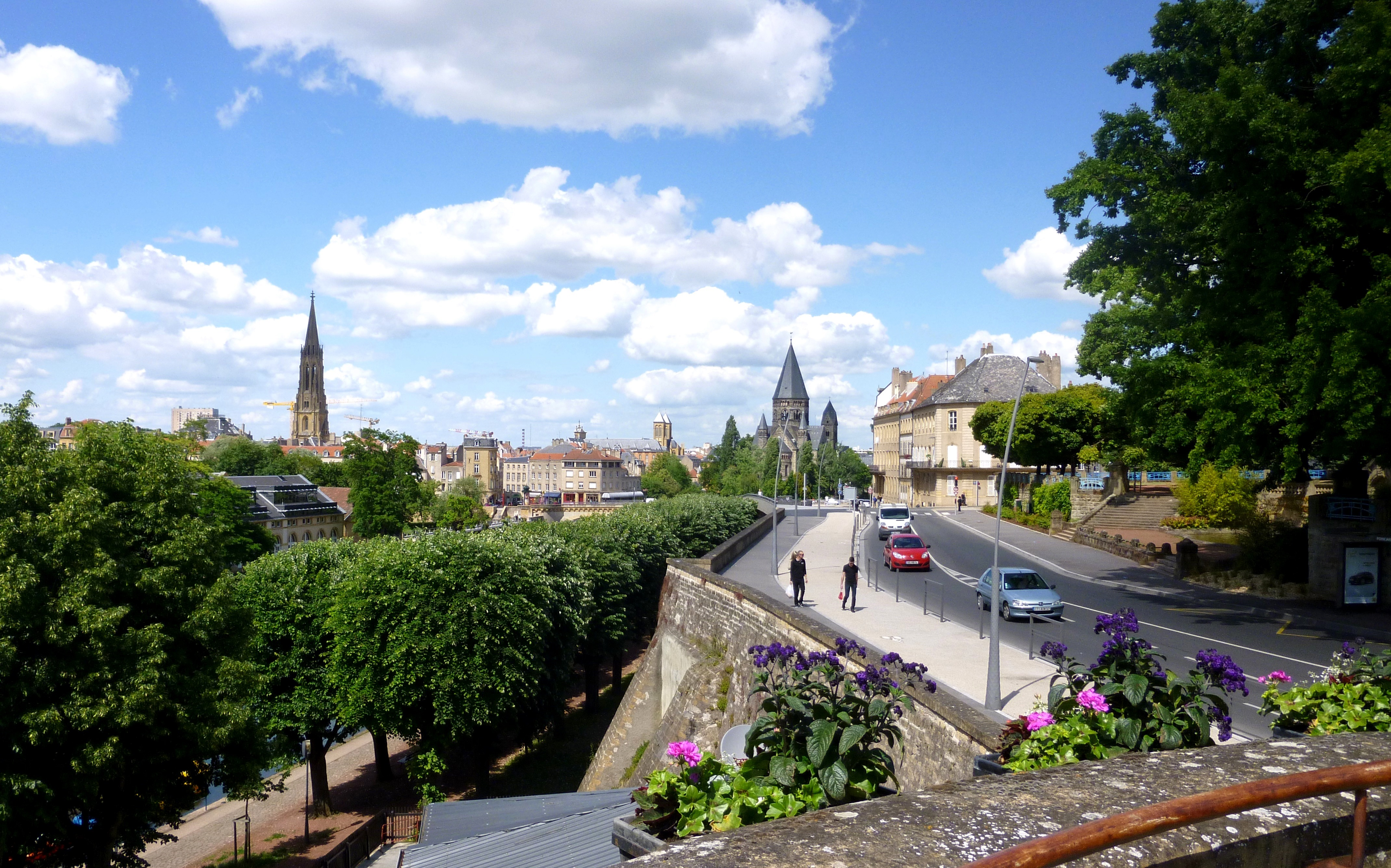 Vue prise depuis la tour-belvédère du boulevard Clémenceau, en contrebas de l'Esplanade. Vue sur le temple de Garnison, le temple Neuf et les anciens remparts.